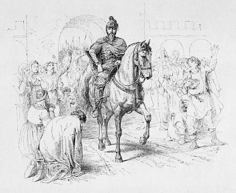 Великий Князь Михаил Юрьевич. 1174-1176 г. Призванный на престол Боголюбского, Михаил II торжественно вступил во Владимир. Живя в веке суровом жестокостью не запятнал имени своего и любил спокойствие народа более власти.